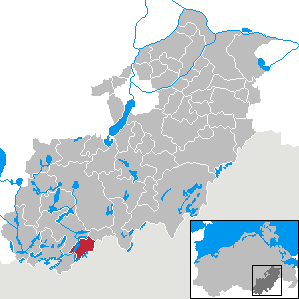 Priepert in Mecklenburg-Vorpommern, Landkreis Mecklenburg-Strelitz